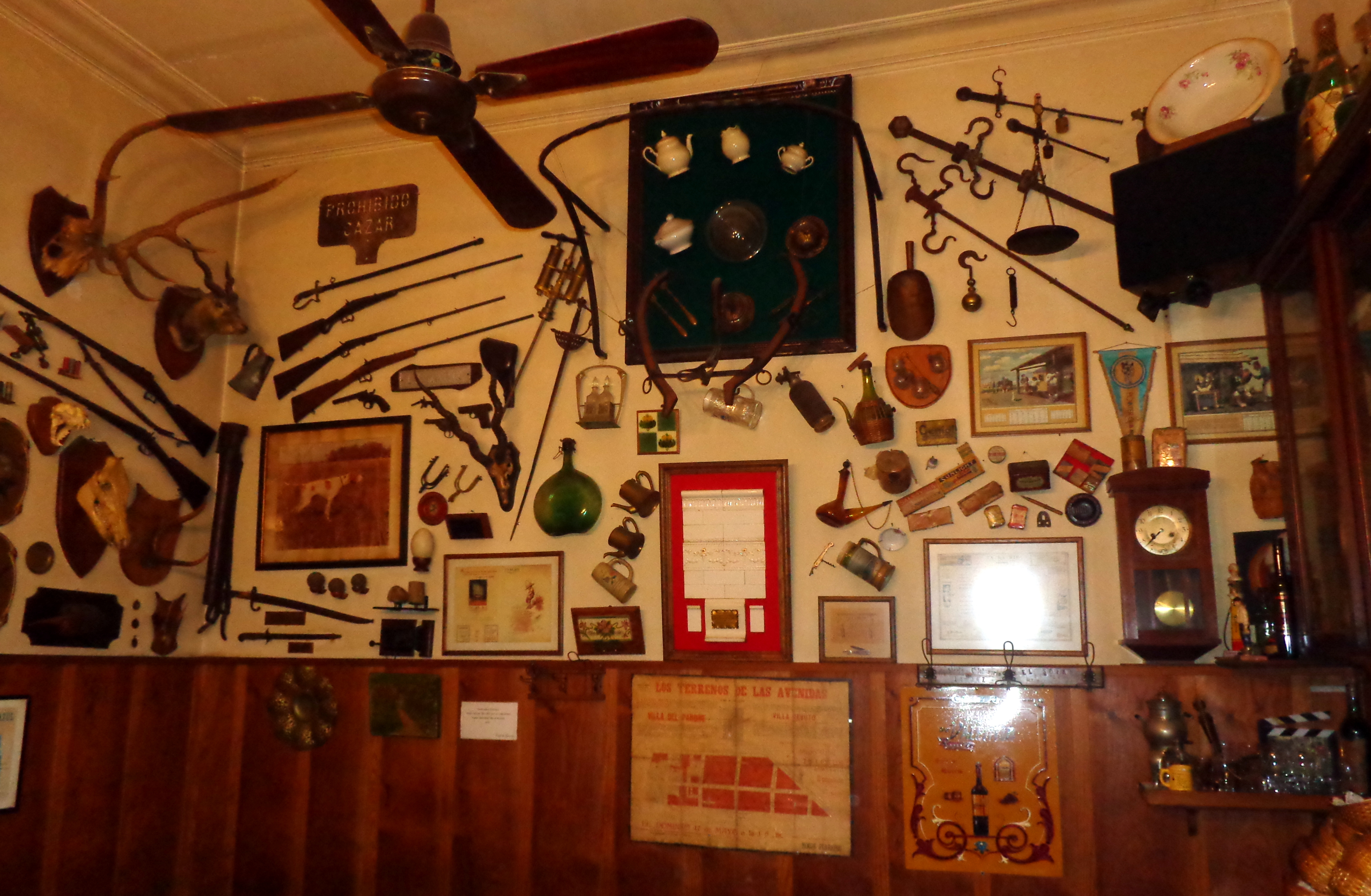 Salón principal, en el Café de García, Calle Sanabria 3302 (esquina con José P. Varela), Villa Devoto, Buenos Aires, Argentina.